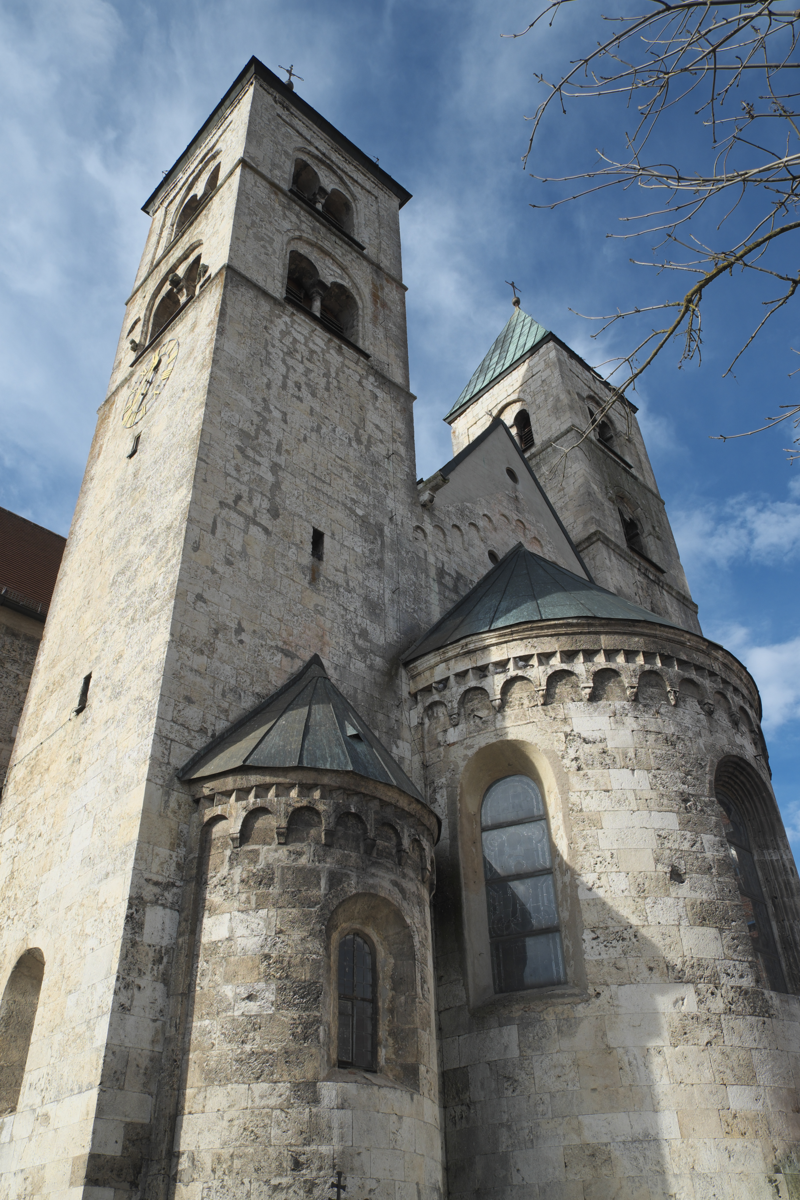 Katholische Pfarrkirche Maria Immaculata in Biburg im niederbayerischen Landkreis Kelheim (Bayern/Deutschland), Apsis und Türme